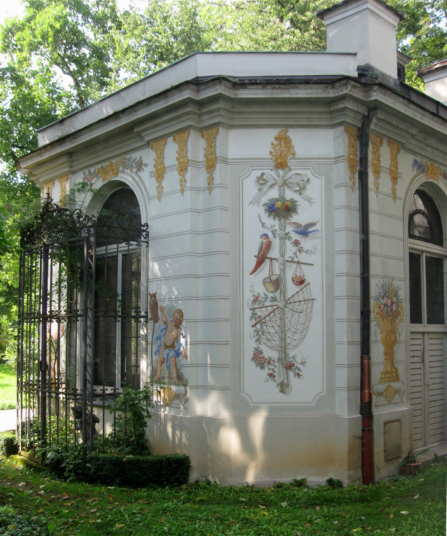 Schlosspark Nymphenburg, Südlicher Kabinettsgarten, Vogelhaus (Südseite)